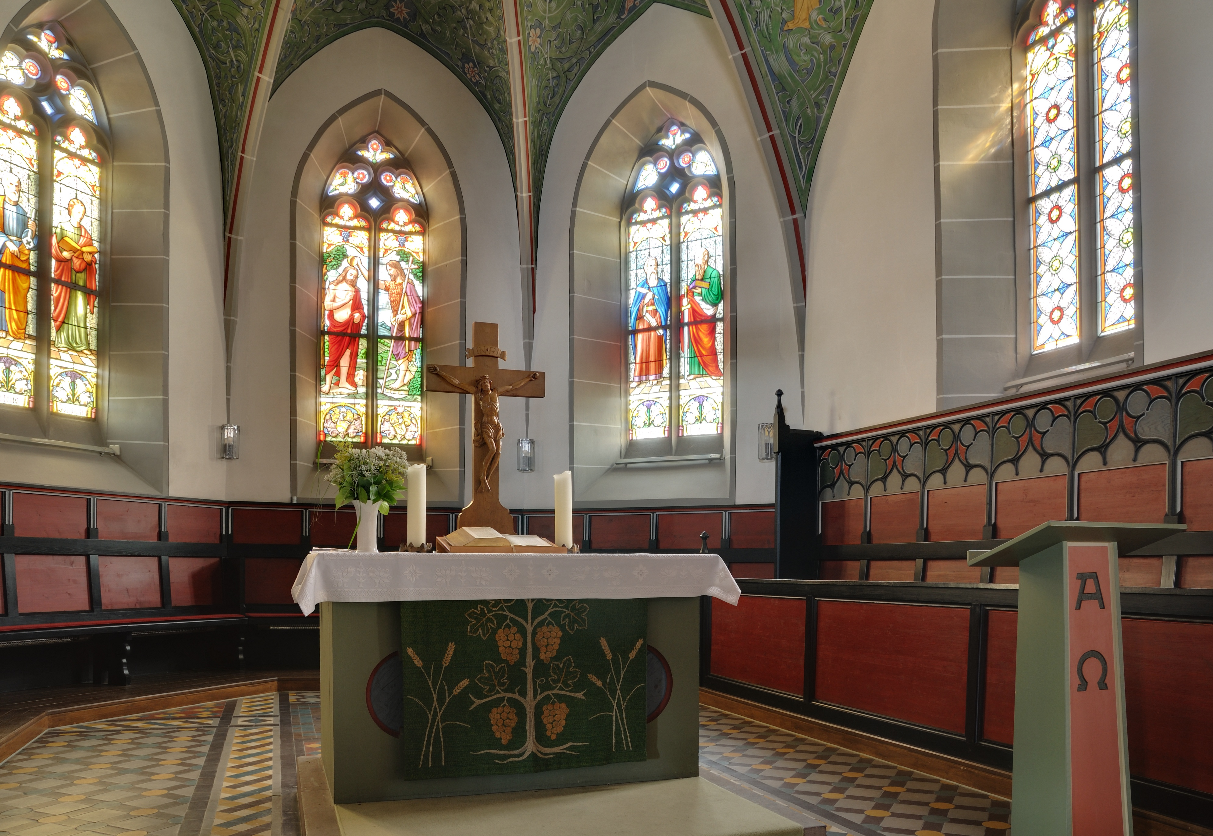 Lörrach: Chor der Germanuskirche